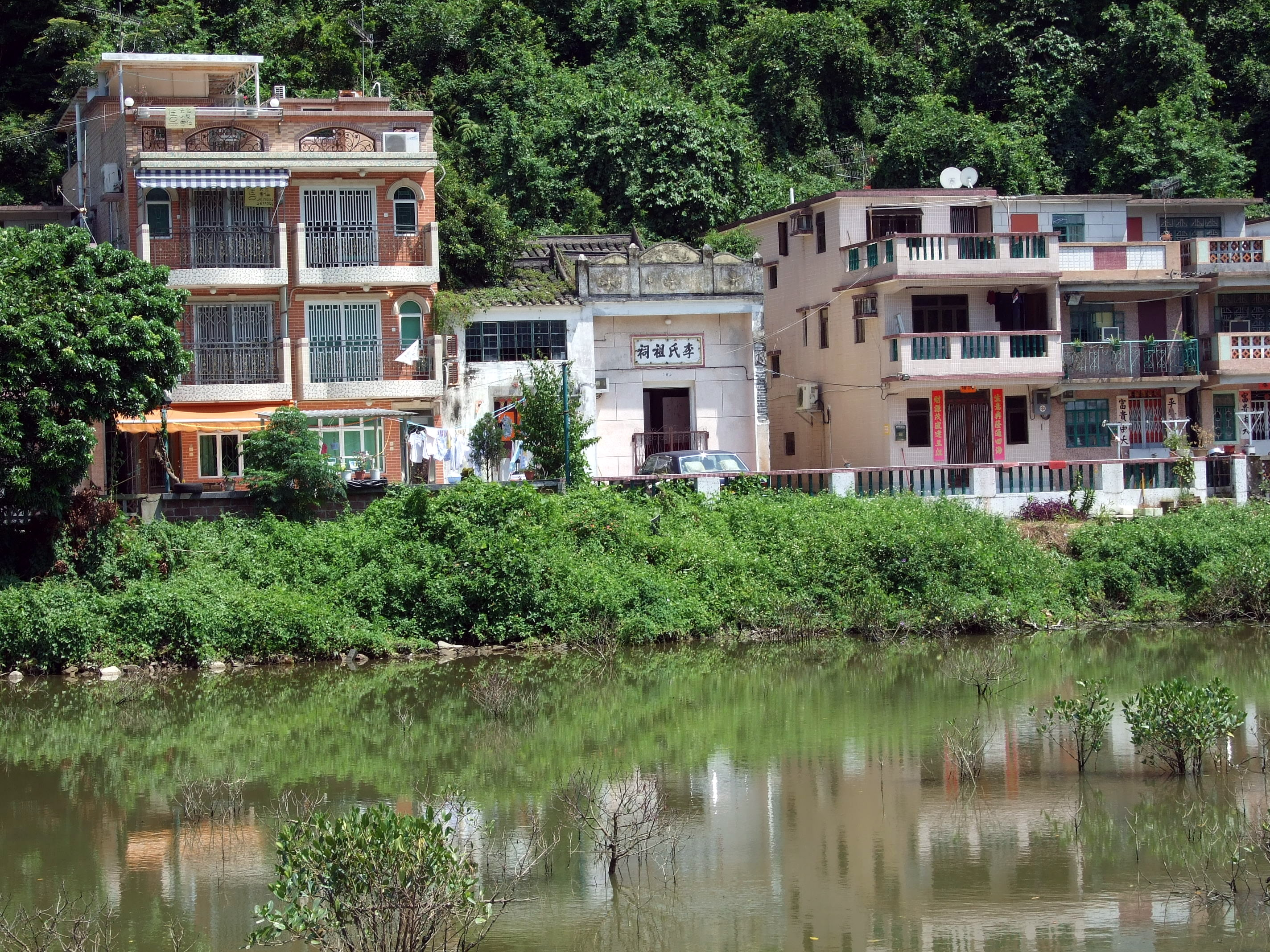 中文（香港）: 南涌李屋